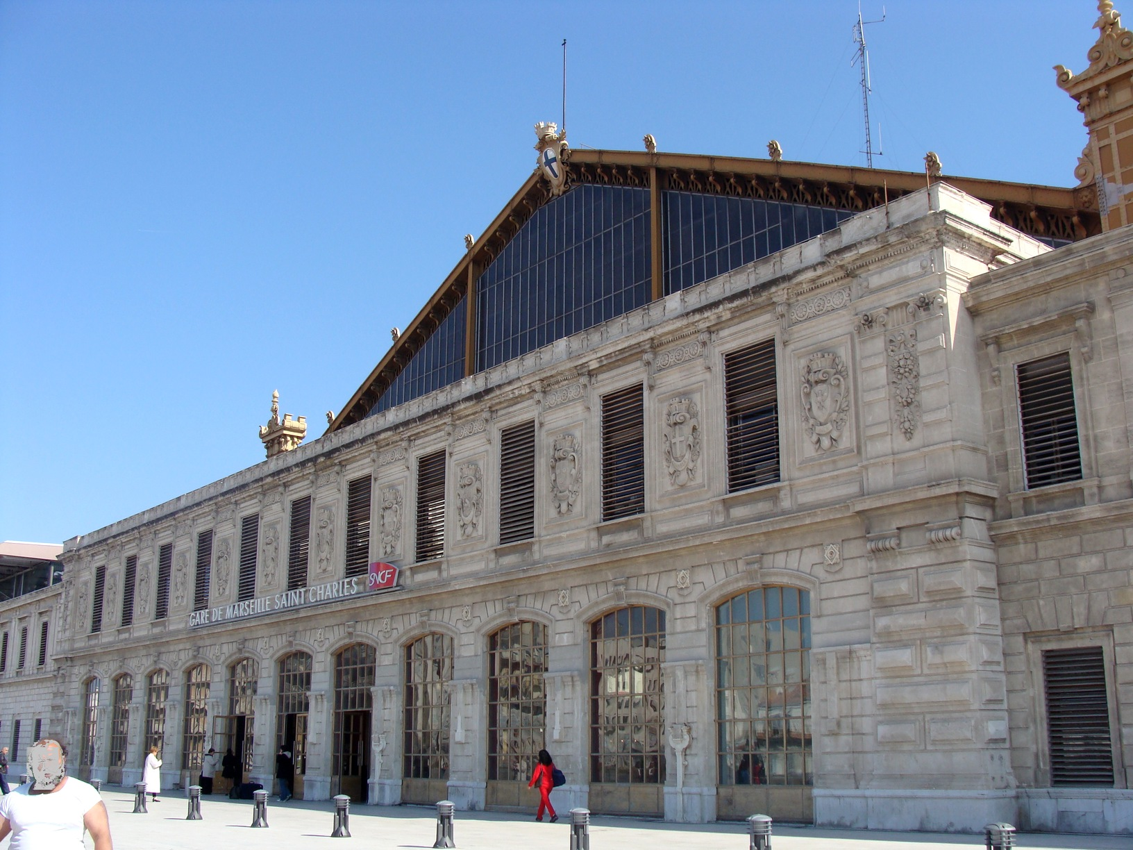 Marseille-Saint-Charles, la façade de la gare remise en son état d'origine